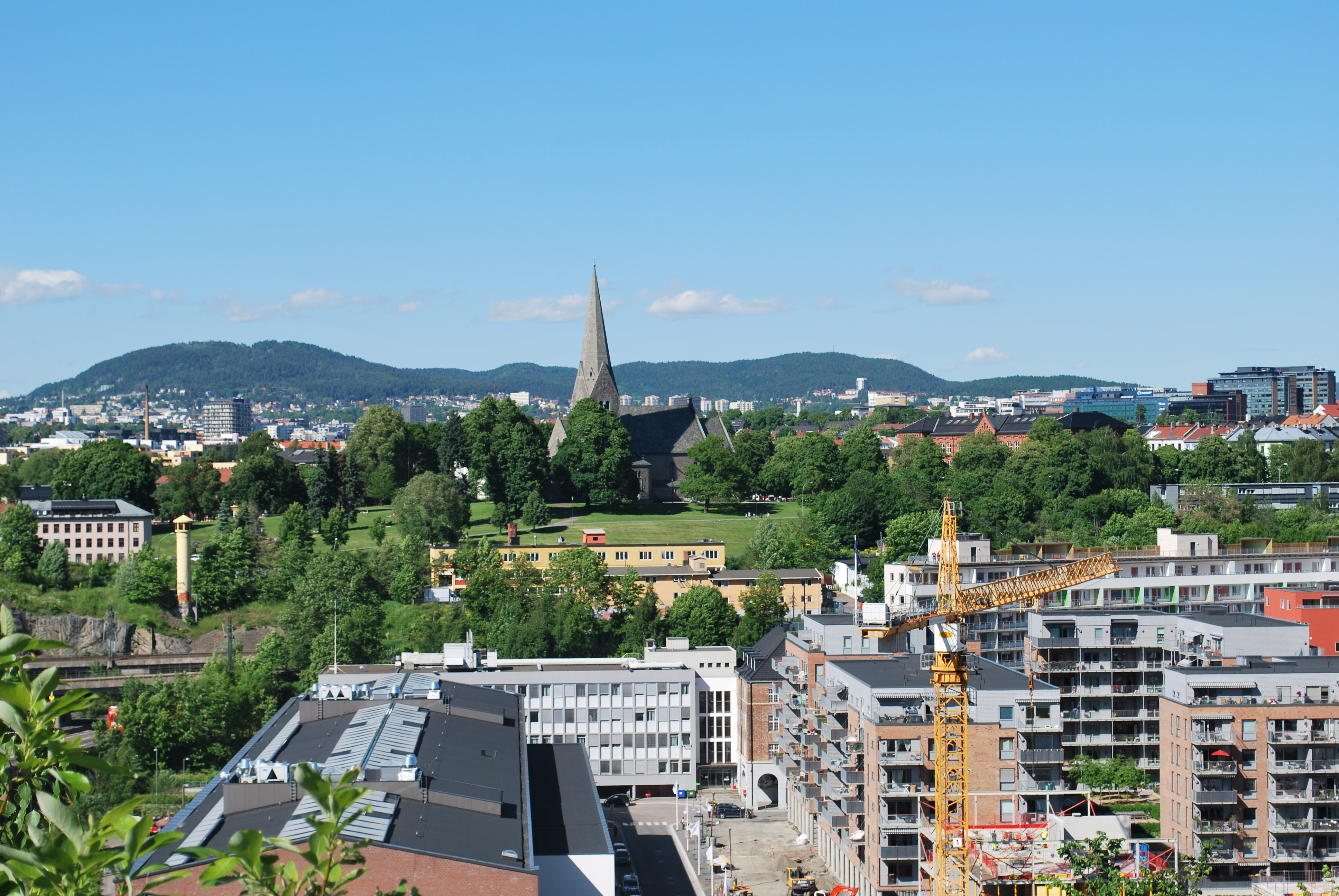 Vålerenga park og Vålerenga kirke sett fra Ekeberg